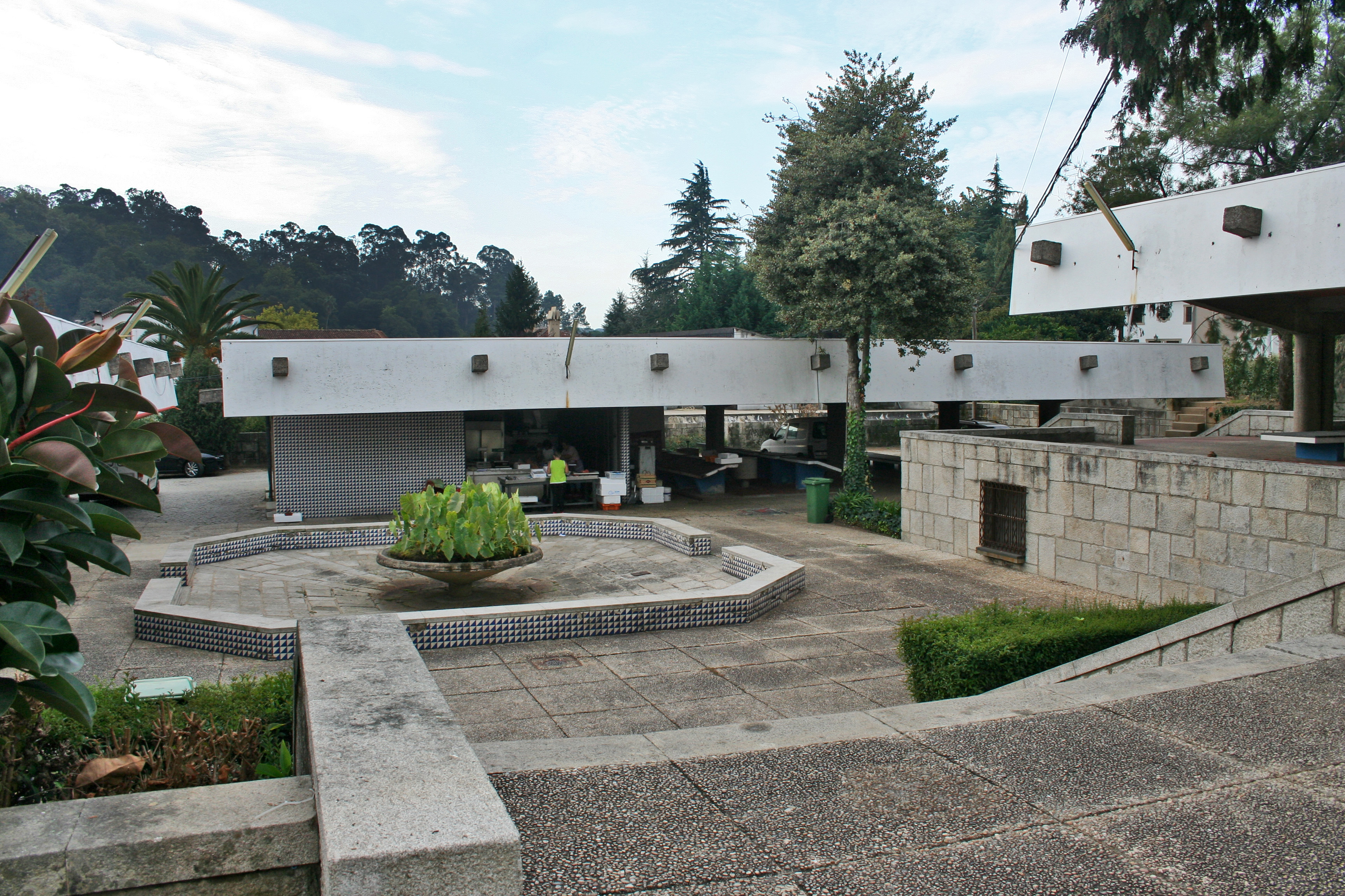 Mercado Municipal de Santa Maria da Feira This file was uploaded for Wiki Loves Monuments in Portugal with the unique identifier 6325648.